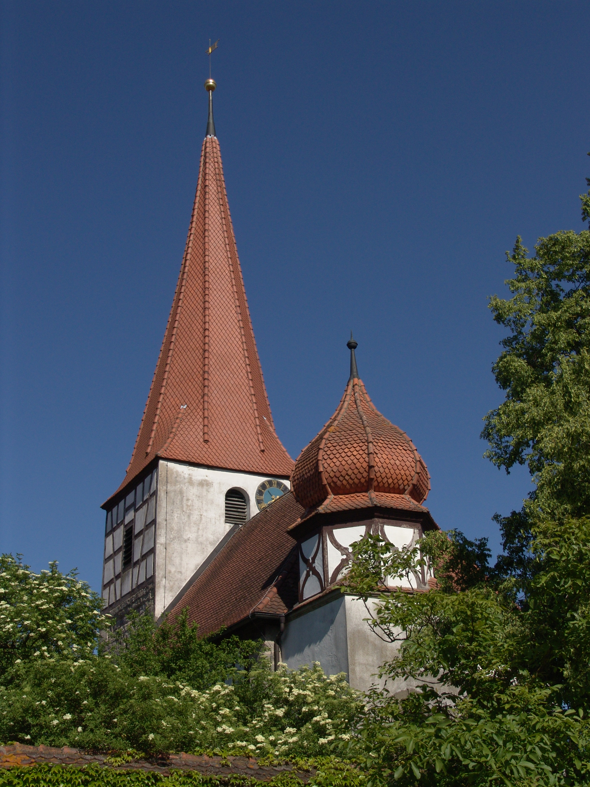 evang.-luth. Kirche in Altheim